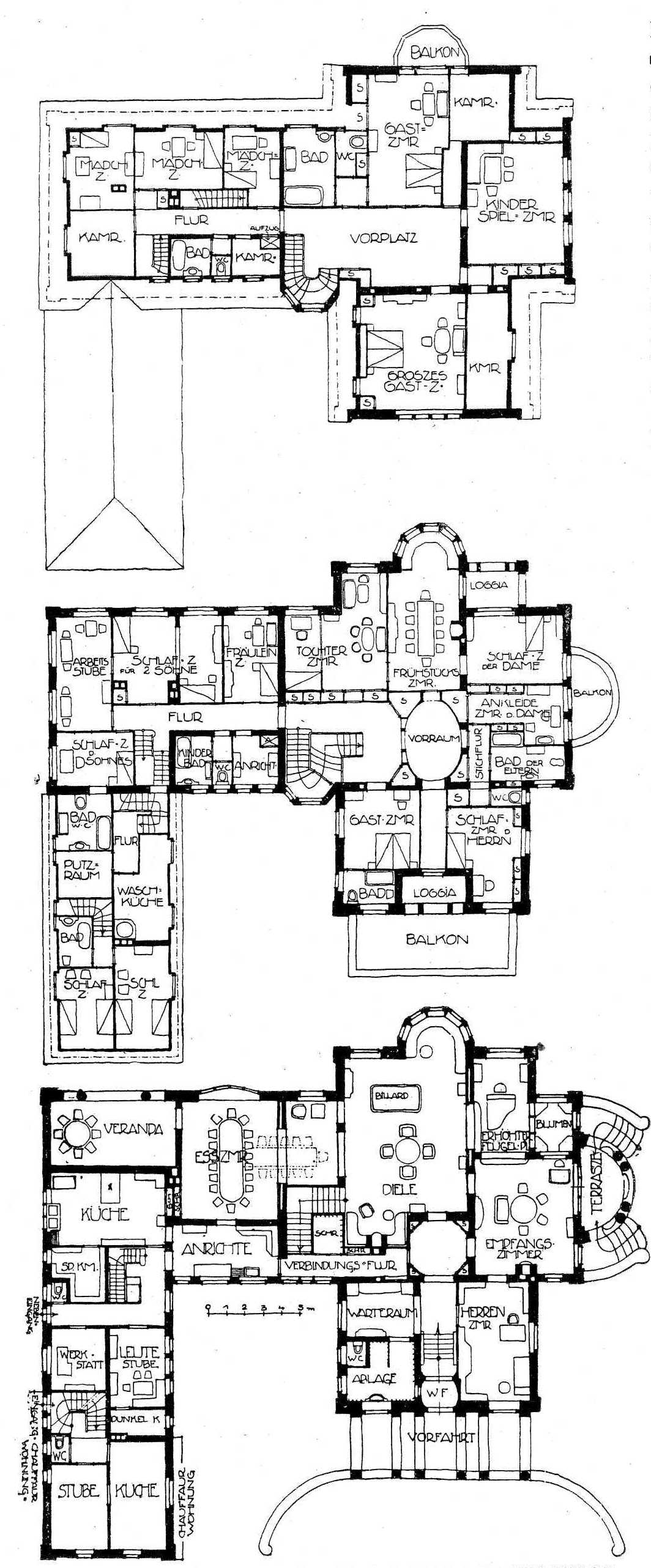 4_Villa_Rümelin_Lerchenstr._Ecke_Alexanderstr.Dachgeschoss,_Obergeschoss_und_Erdgeschoss.jpg